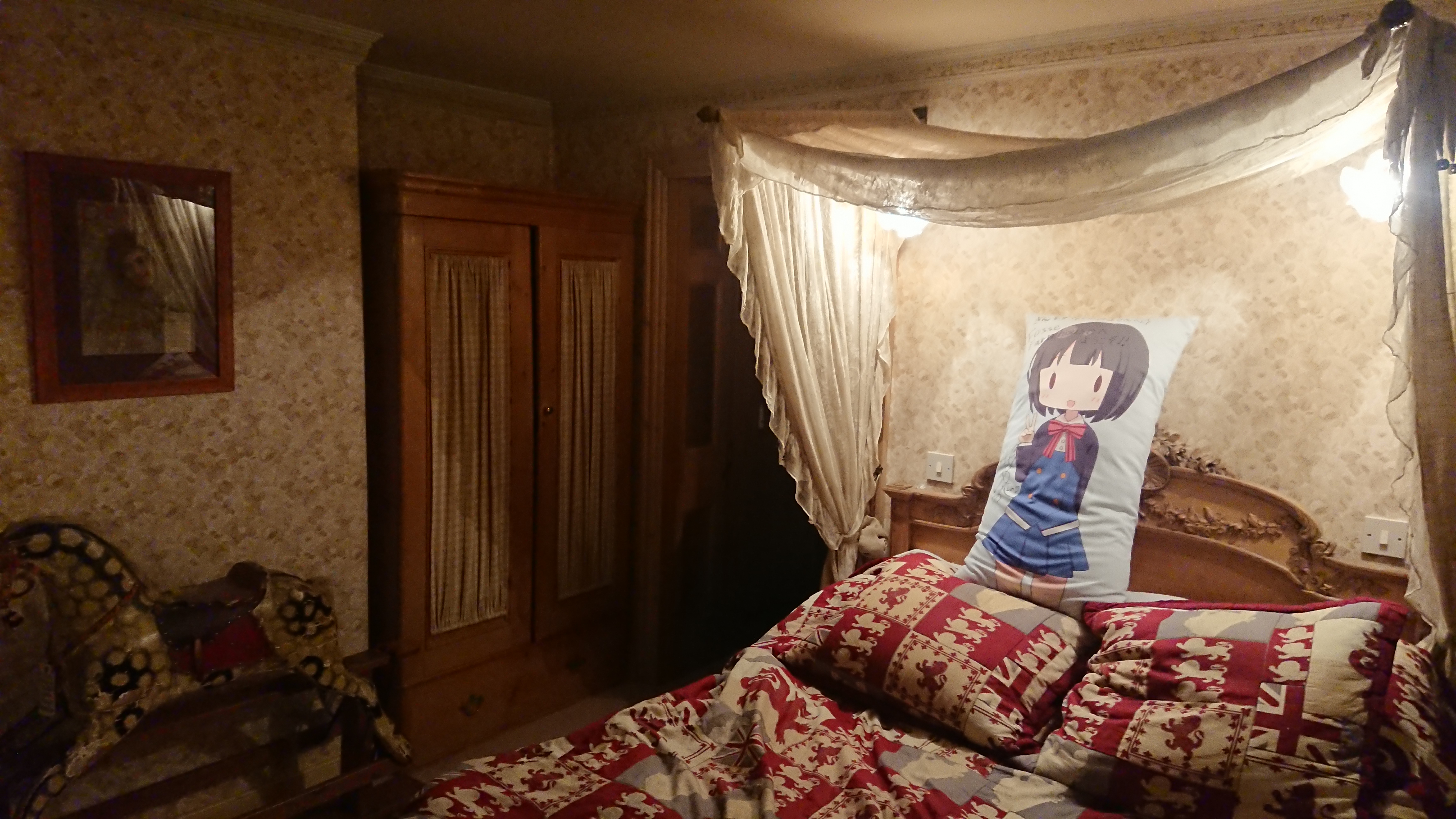 フォス・ファームハウス、パインルームにて。